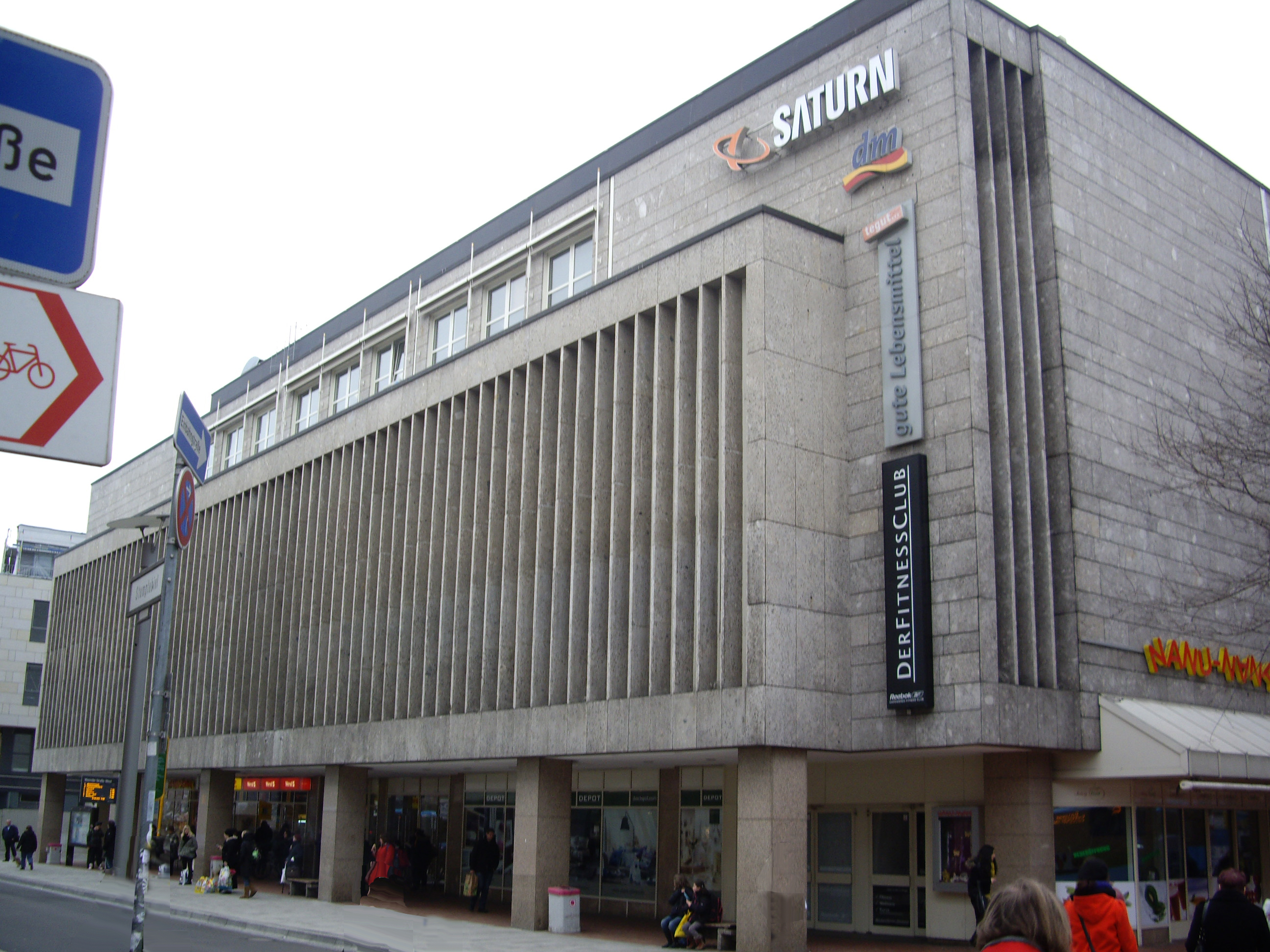 Carré-Gebäude Göttingen, Südansicht, April. Foto: F. Welter-Schultes 2013.